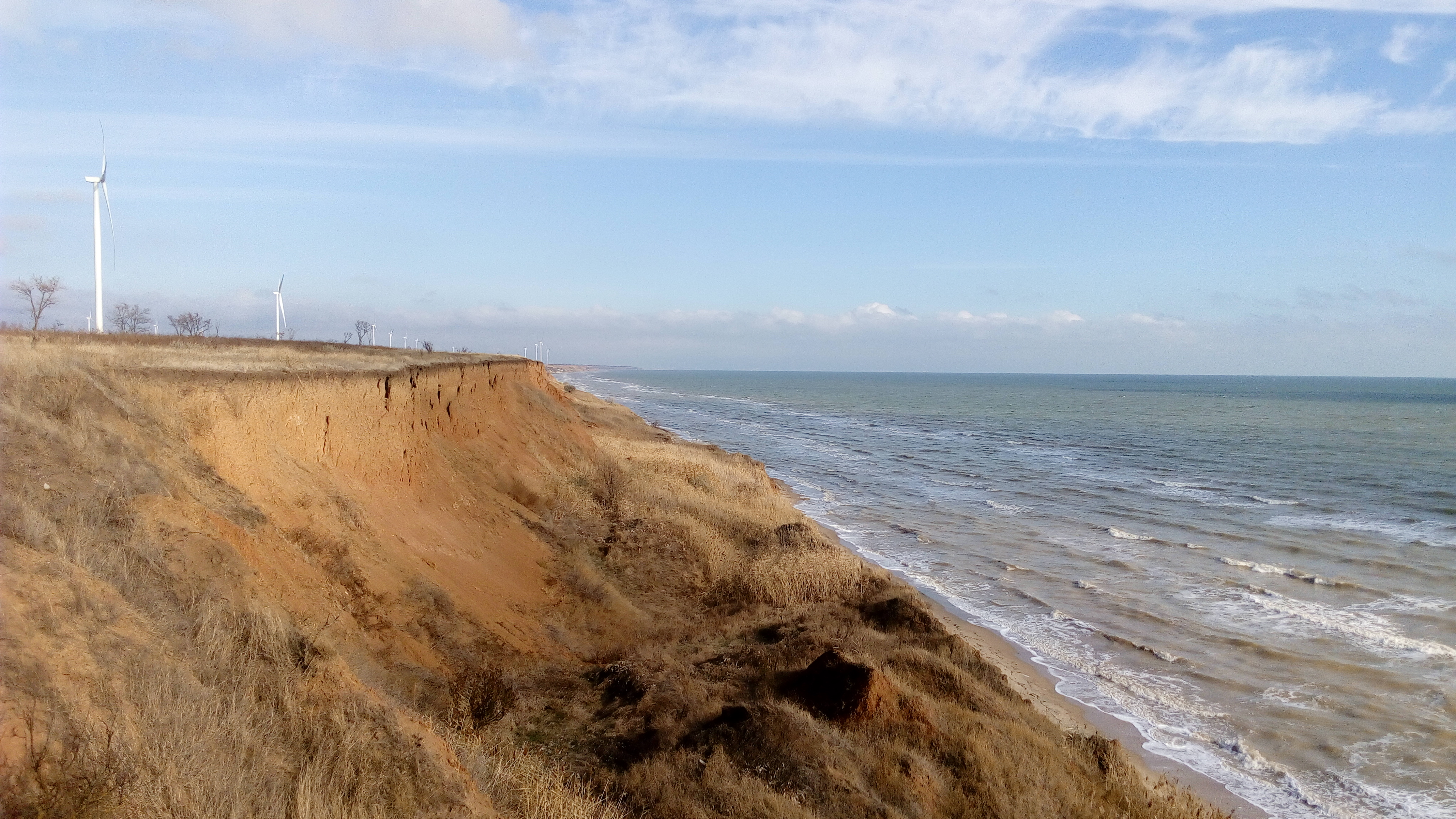 Україна, Запорізька область, місто Приморськ, ВЕС на кручах.